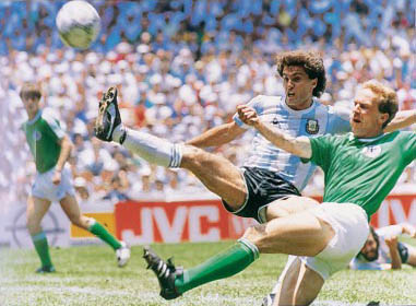 Ruggeri pelea el balón con Rumenigge en la Final de México 1986.